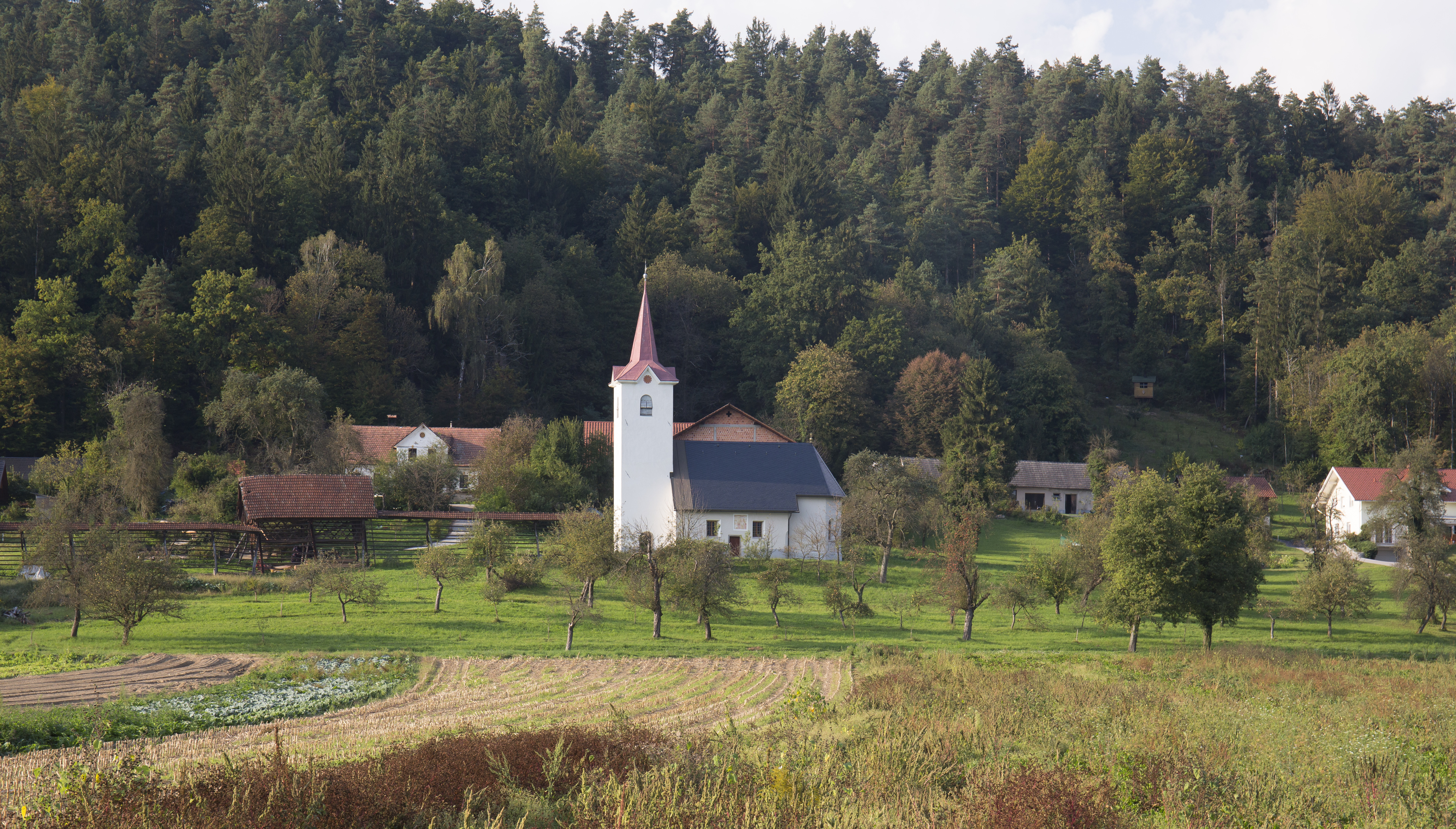 Cerkev sv. Katarine Aleksandrijske, Zaboršt pri Dolu, Slovenija.